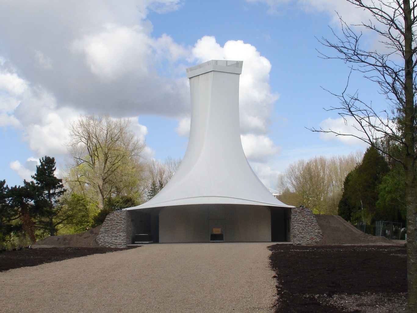 Crematorion op begraafplaats Zorgvlied in Amsterdam, geopend op 17 maart 2016. Ontworpen door GroupA architecten.